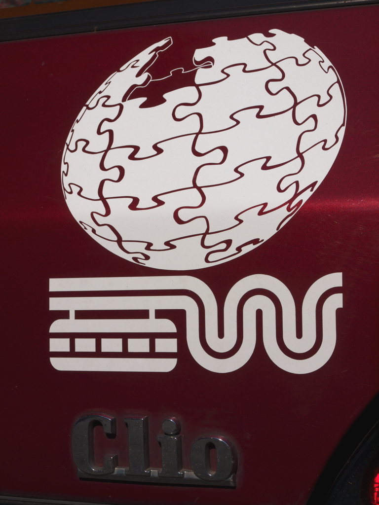 Wuppertal Logo (Wupperwurm) Wikipedialogo als Aufkleber auf Autoheckklappe